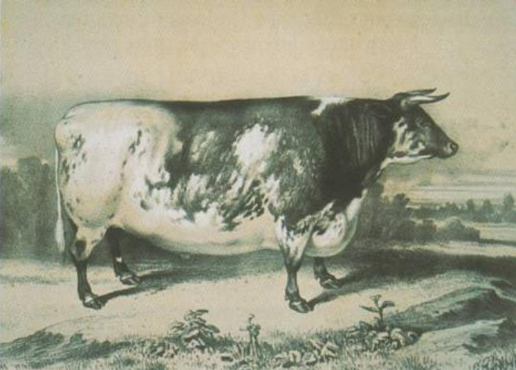 "Océan", lithographie d'un boeuf anglais parue dans Lithographies représentant des boeufs primés au concours de Poissy.